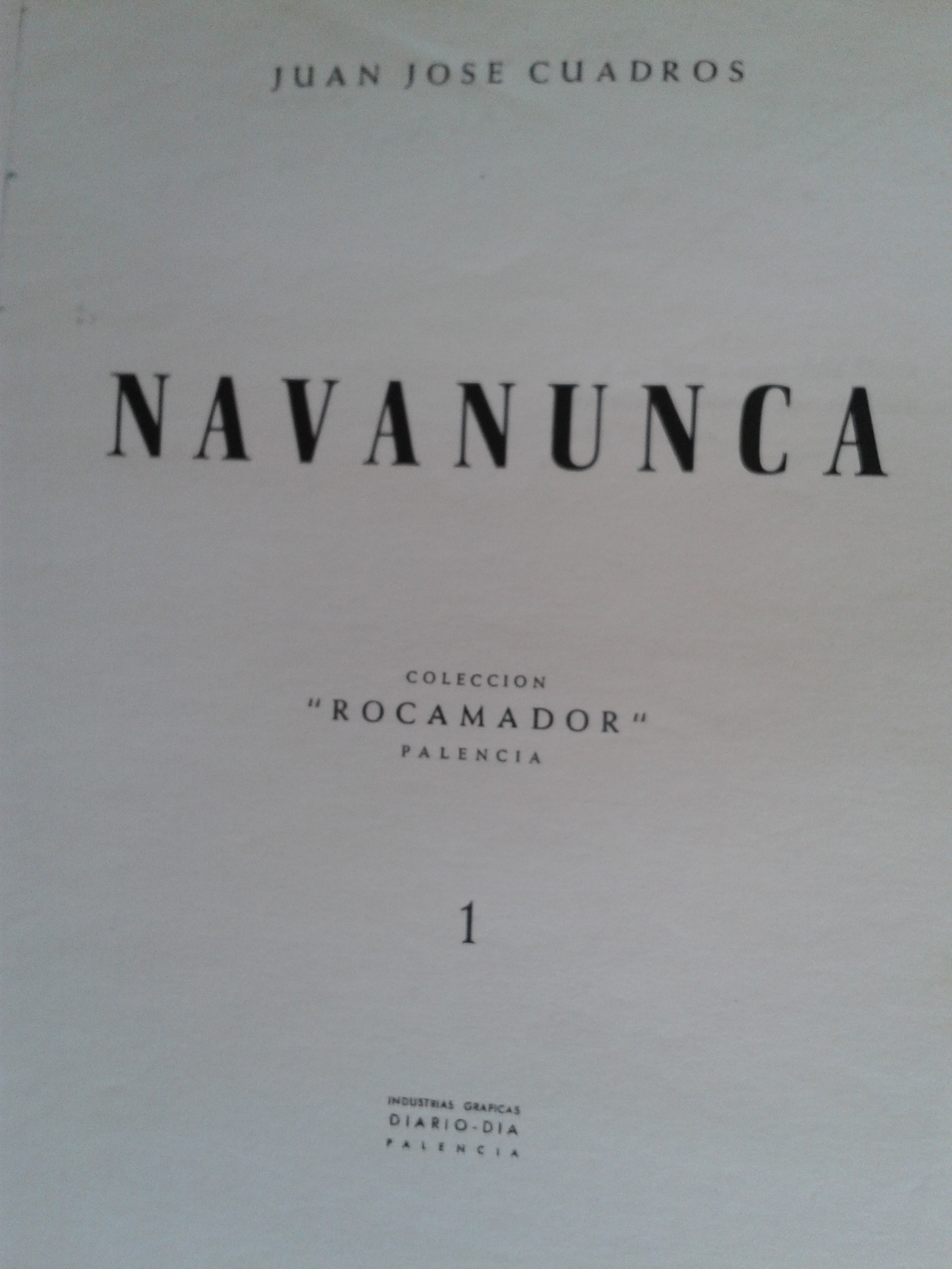 Navanunca de Juan José Cuadros, 1961